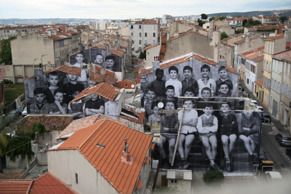 Friche Belle de Mai